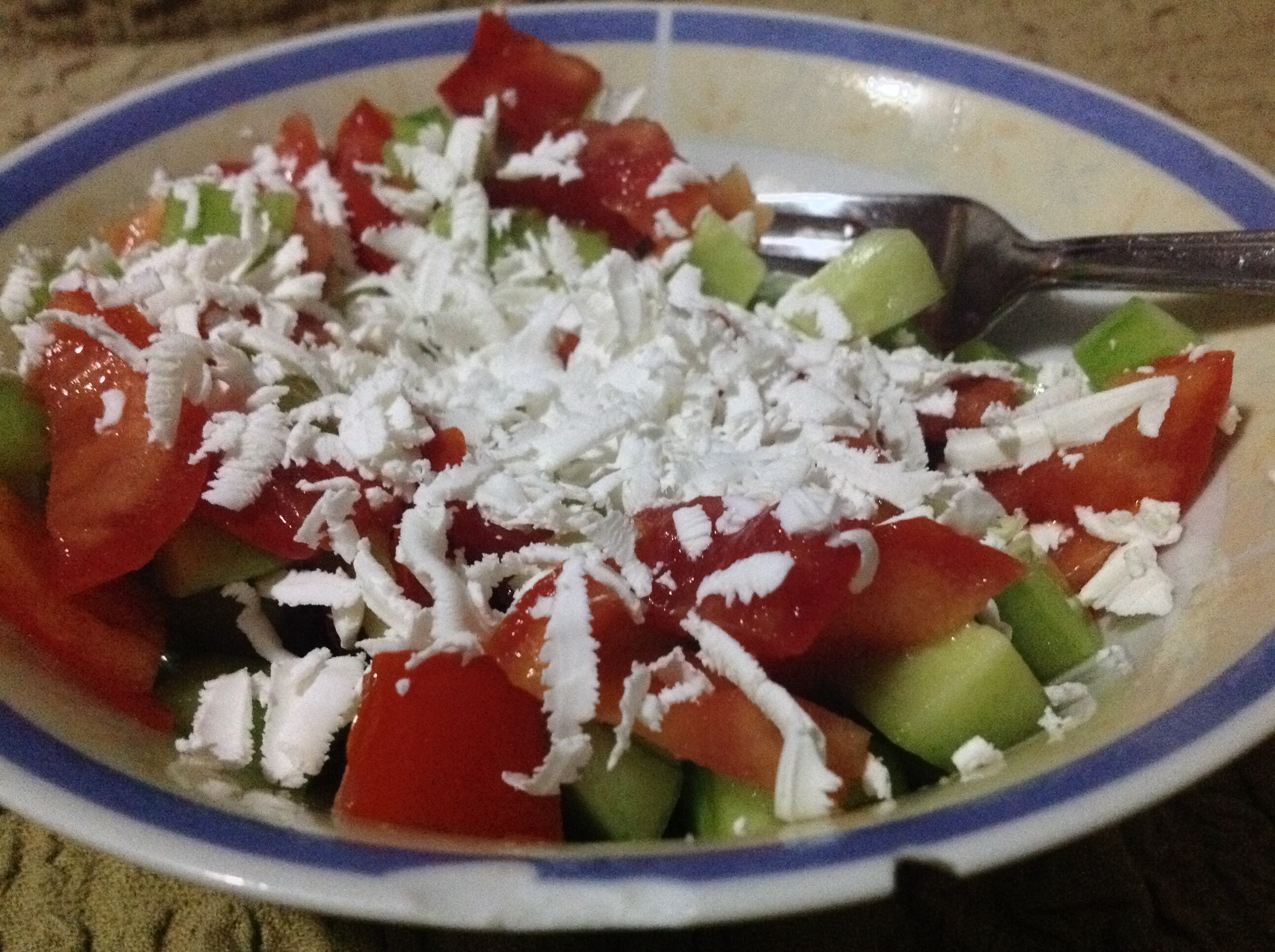 Шопската салата е едно од македонските традиционални предјадења, а освен кај нас се карактеристична е и за Бугарија и Србија. За потекло на оваа салата се зема регионот околу Шоплук препознатлив по доброто сирење коешто жителите го користеле во најразлични јадења.Името го добива според словенското племе Шопи кое живеело на тој регион.